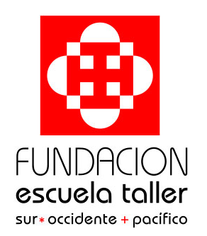 La Fundación Escuela Taller de Popayán hace parte del programa Escuela Taller desde 1995 por un acuerdo marco de cooperación suscrito entre Colcultura, el SENA, la Gobernación del Cauca. LA Alcaldía de Popayán, la Corporación de Turismo del Cauca y la Agencia Española de Cooperación Internacional. El 17 de Octubre de 1997 adquirimos la personería jurídica y nos constituimos en una fundación privada sin ánimo de lucro ante la Cámara de Comercio de Cauca.